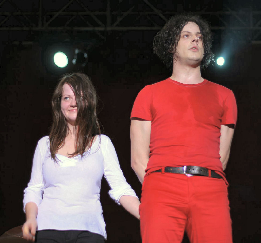 Primavera @ playlist.fluctuat